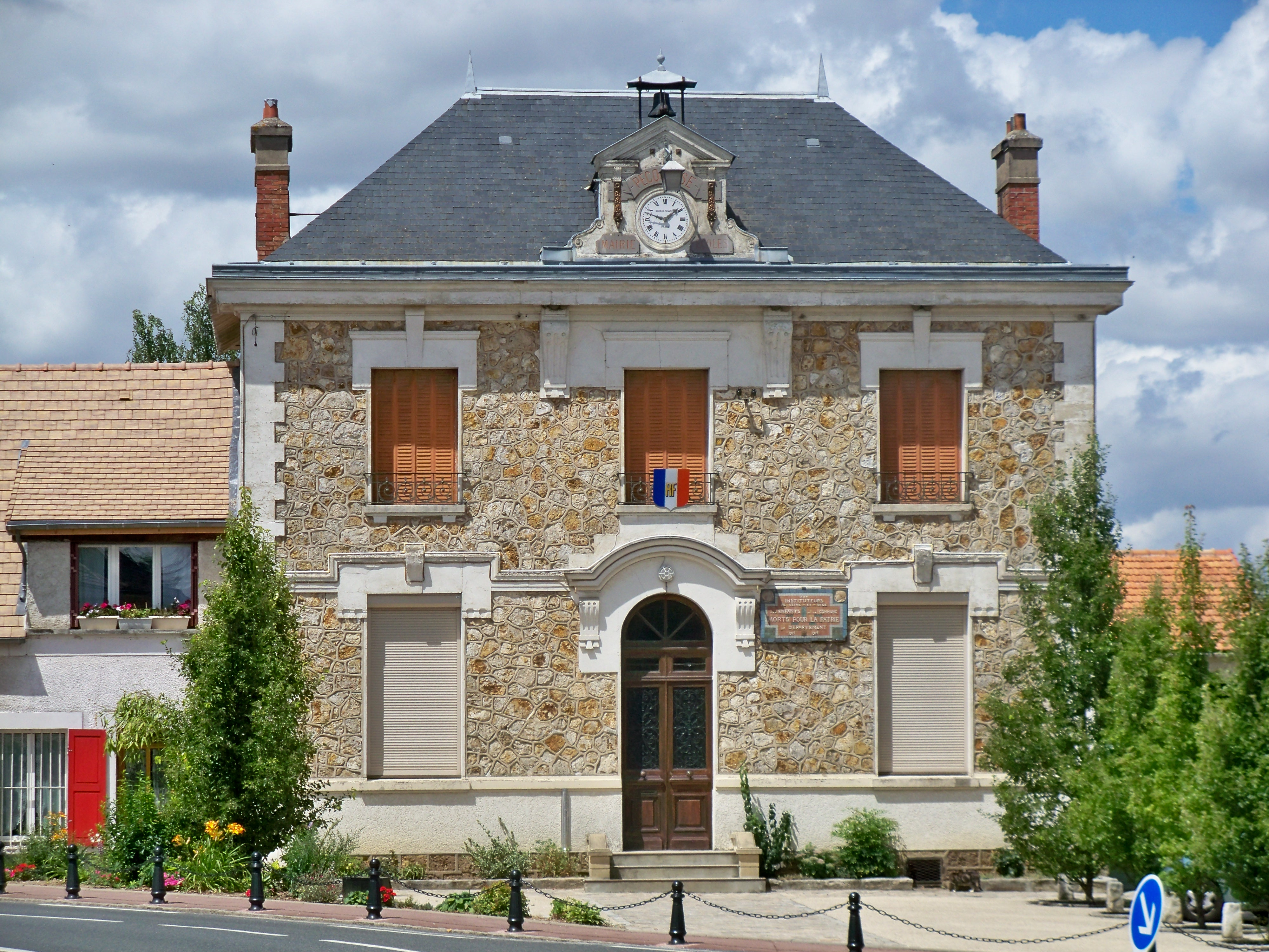 ancienne école de Pecqueuse, Essonne, France